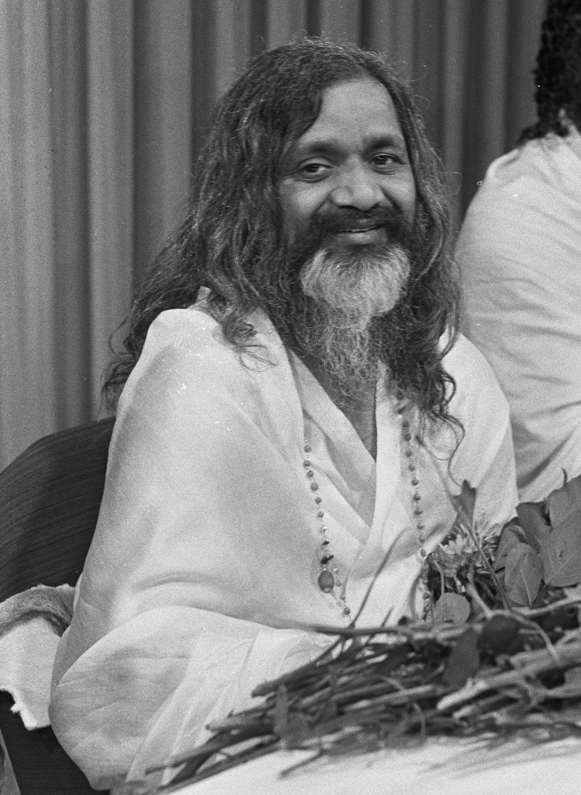 Collectie / Archief : Fotocollectie Anefo Reportage / Serie : [ onbekend ] Beschrijving : Aankomst Maharish Makesh Yogi op Schiphol. M. M. Yogi vergezeld van Dramayari Dovendra (rechts) op persconferentie Datum : 1 september 1967 Locatie : Noord-Holland, Schiphol Trefwoorden : aankomsten, persconferenties Persoonsnaam : Yogi, Maharishi Mahesh Fotograaf : Merk, Ben / Anefo Auteursrechthebbende : Nationaal Archief Materiaalsoort : Negatief (zwart/wit) Nummer archiefinventaris : bekijk toegang 2.24.01.05 Bestanddeelnummer : 920-6591